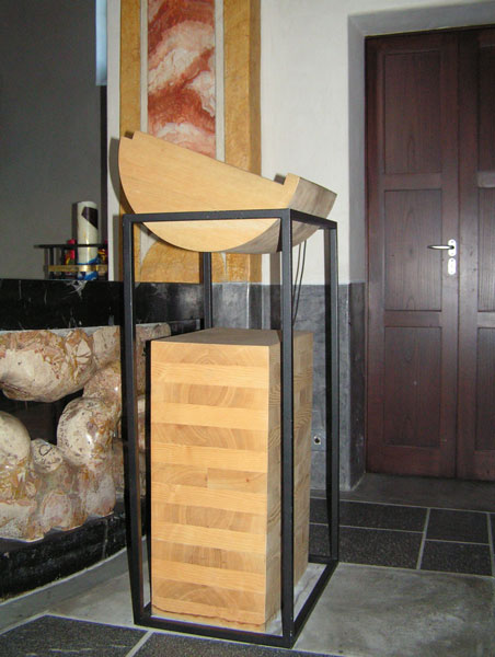 Artist :Gianfredo Camesi Title : «Ambone», Church SS. Quirico e Giulitta, Melide, Switzerland. 1995.